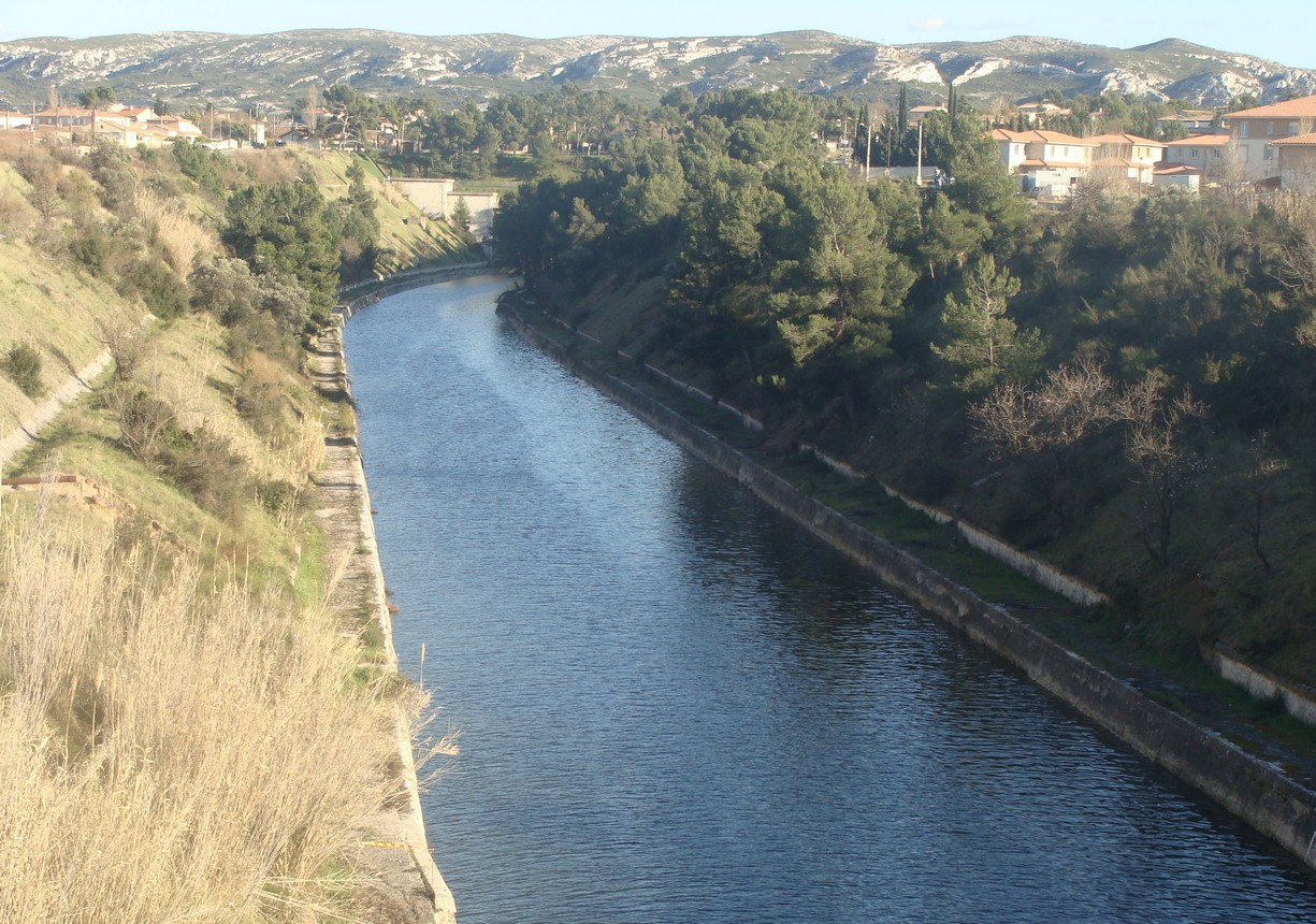 Le canal de Marseille au Rhône dans la traversée de Marignane, vue prise en direction du sud-est. Au fond, la chaîne de l'Estaque.